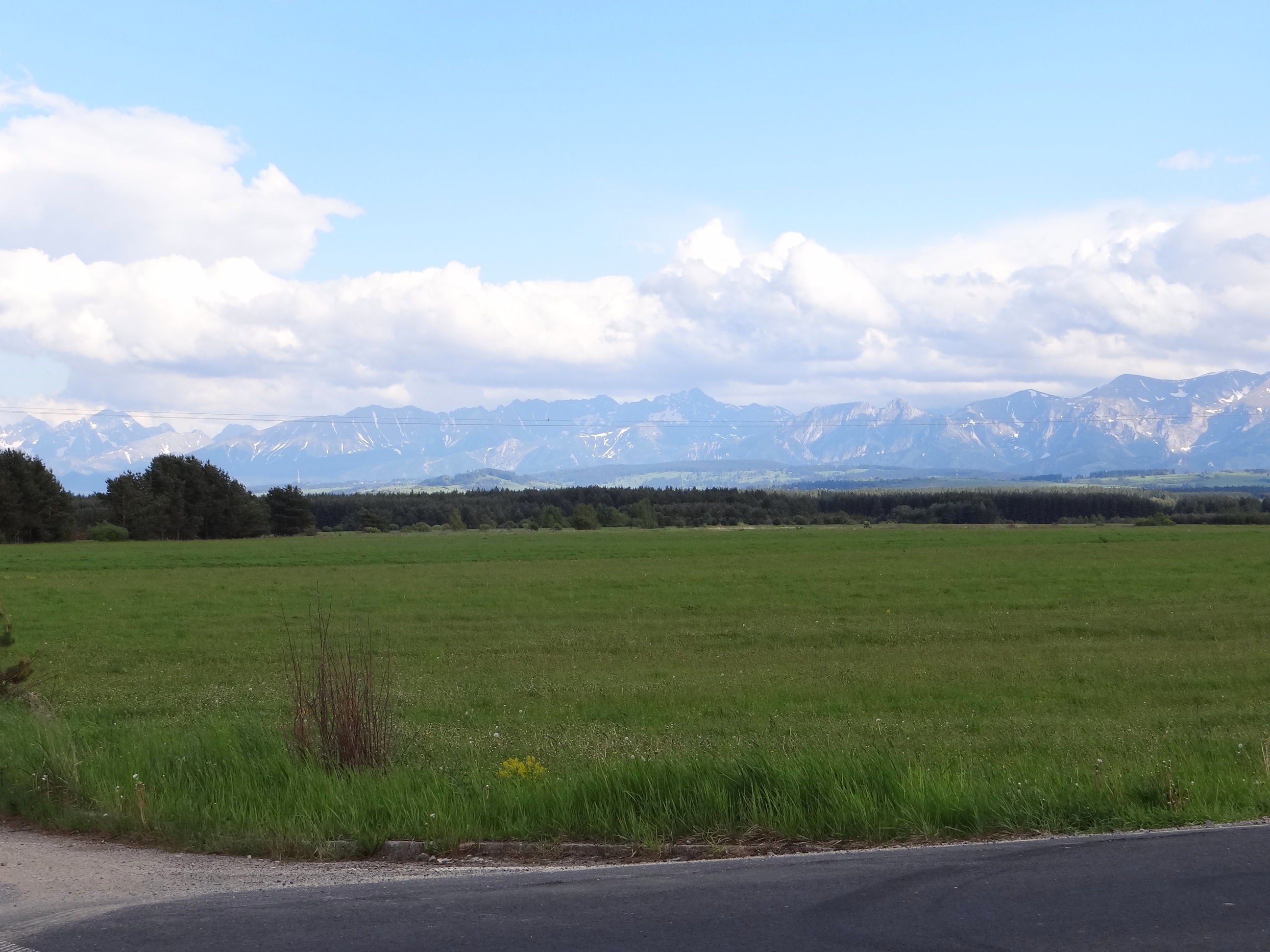 Kotlina Nowotarska w Chyżnem. W głębi Tatry